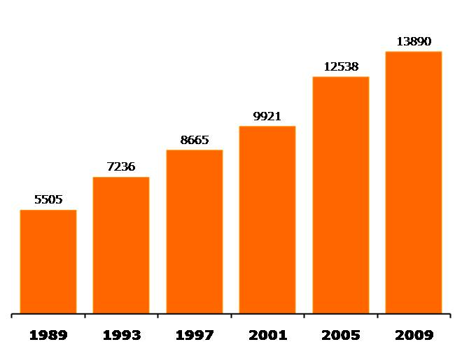 Norsk (bokmål): Sametingets valgmanntall